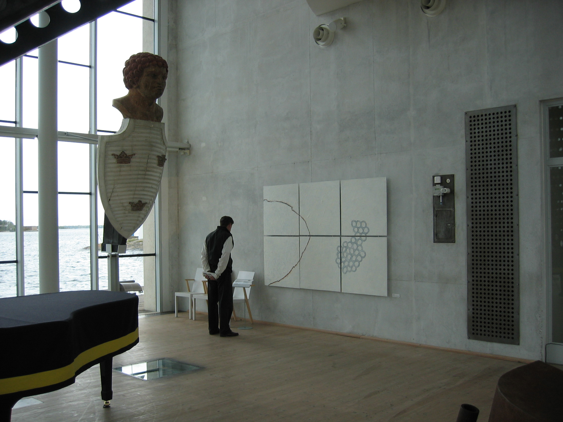 Målning på Marinmuseet i Karlskrona